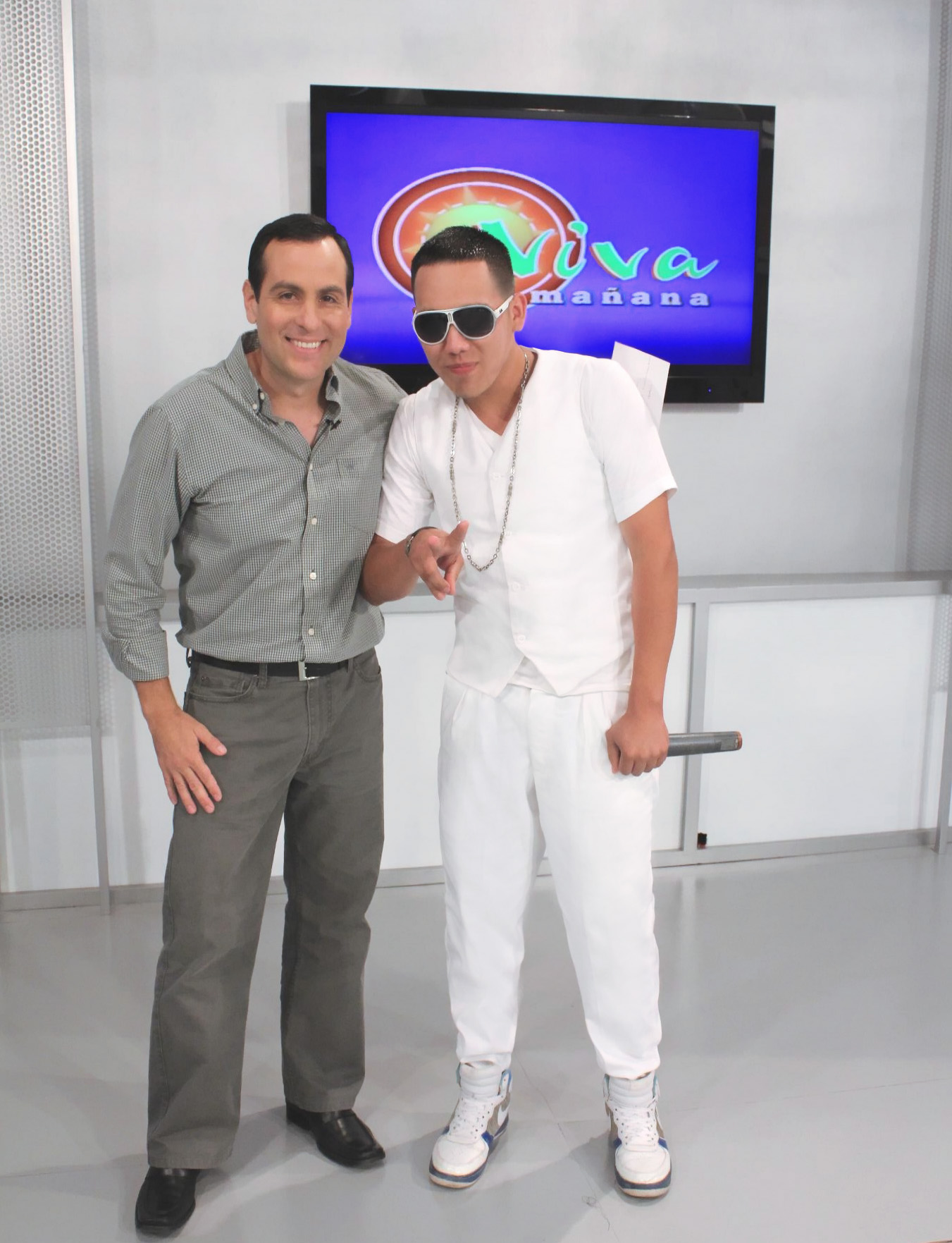 La musica es un reencuentro con lo que llevamos dentro.